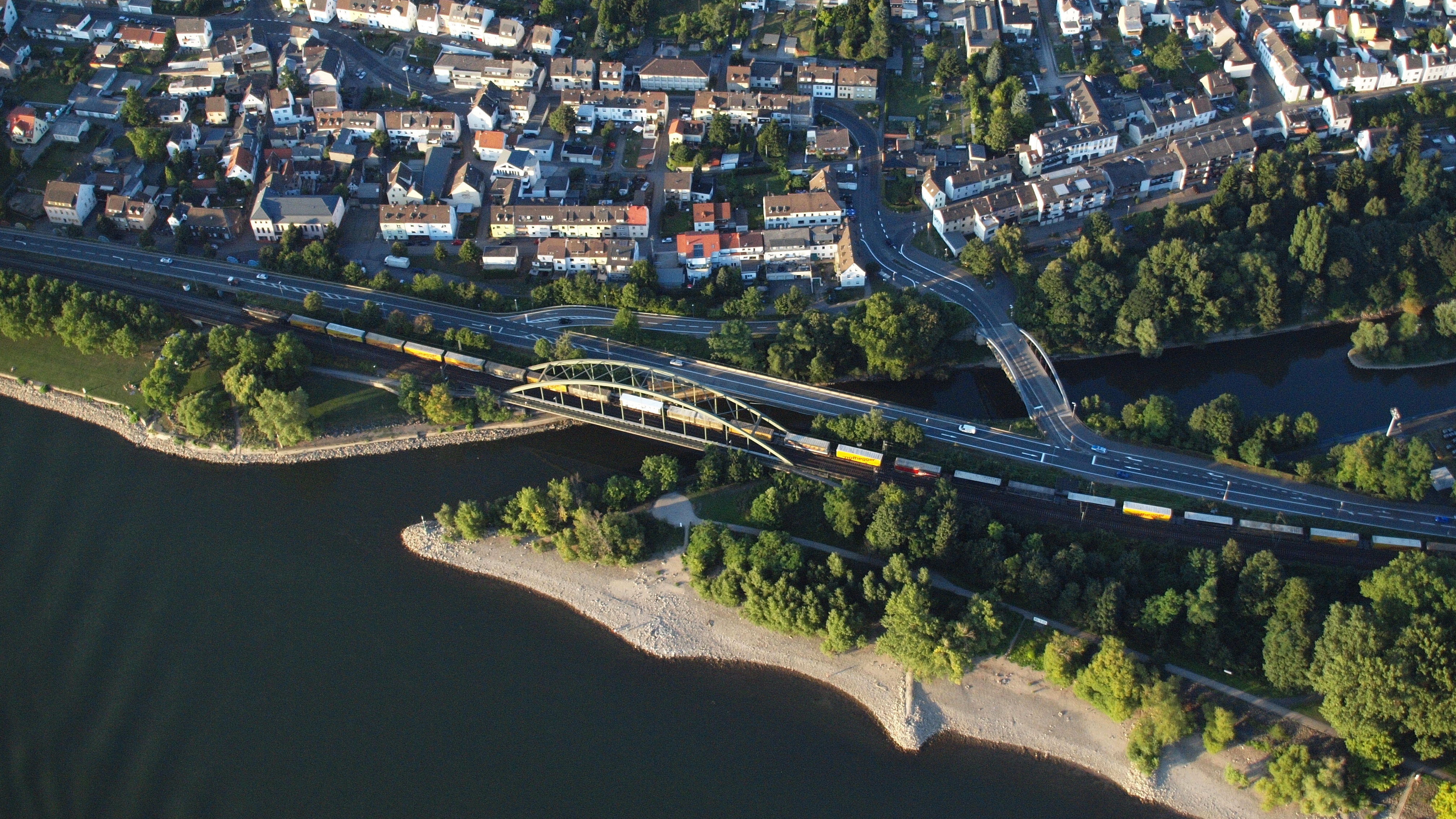 Mündung der Wied in den Rhein am Ortsrand von Irlich